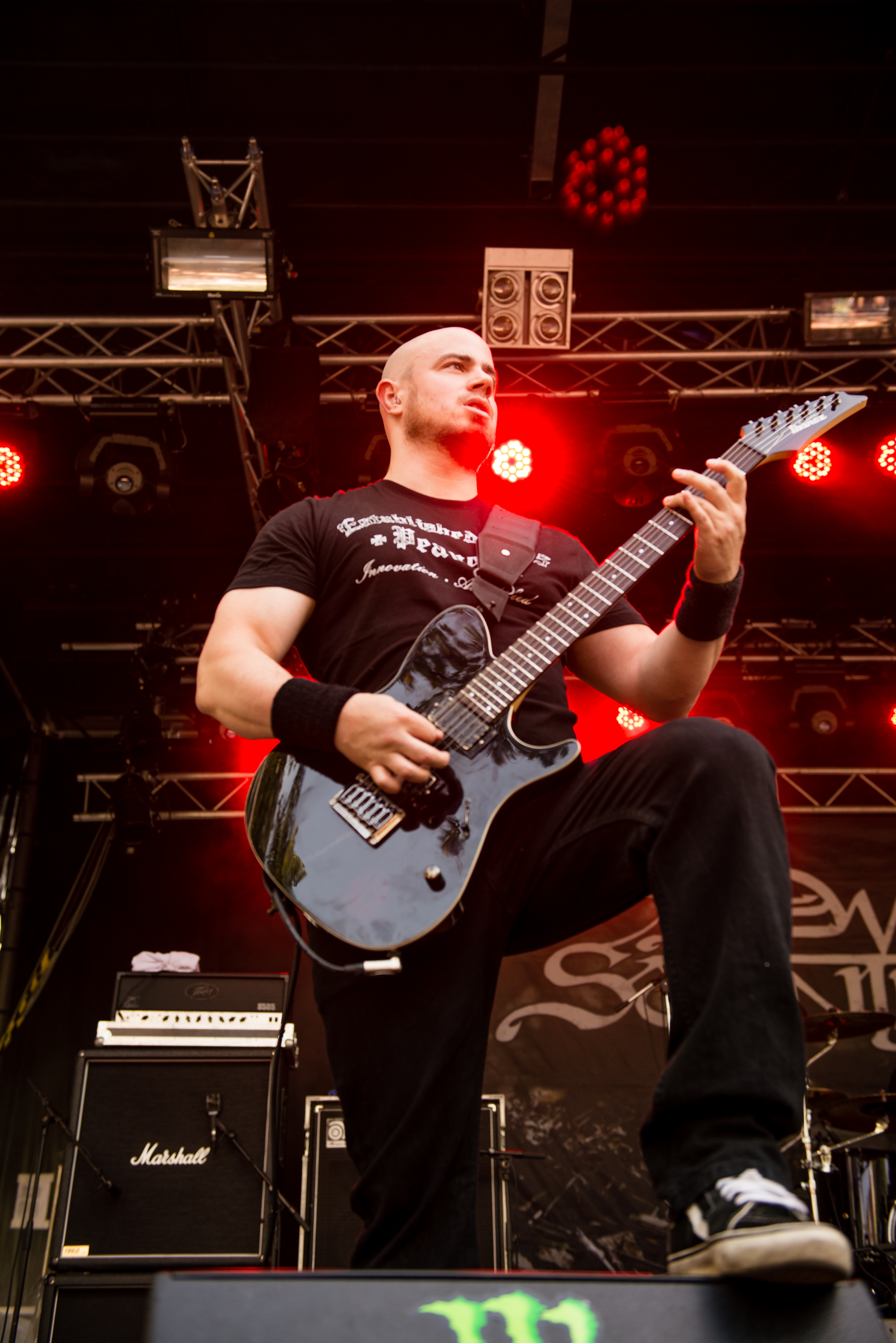 'Nord Open Air 2014 - Essen': 'Dew-Scented'